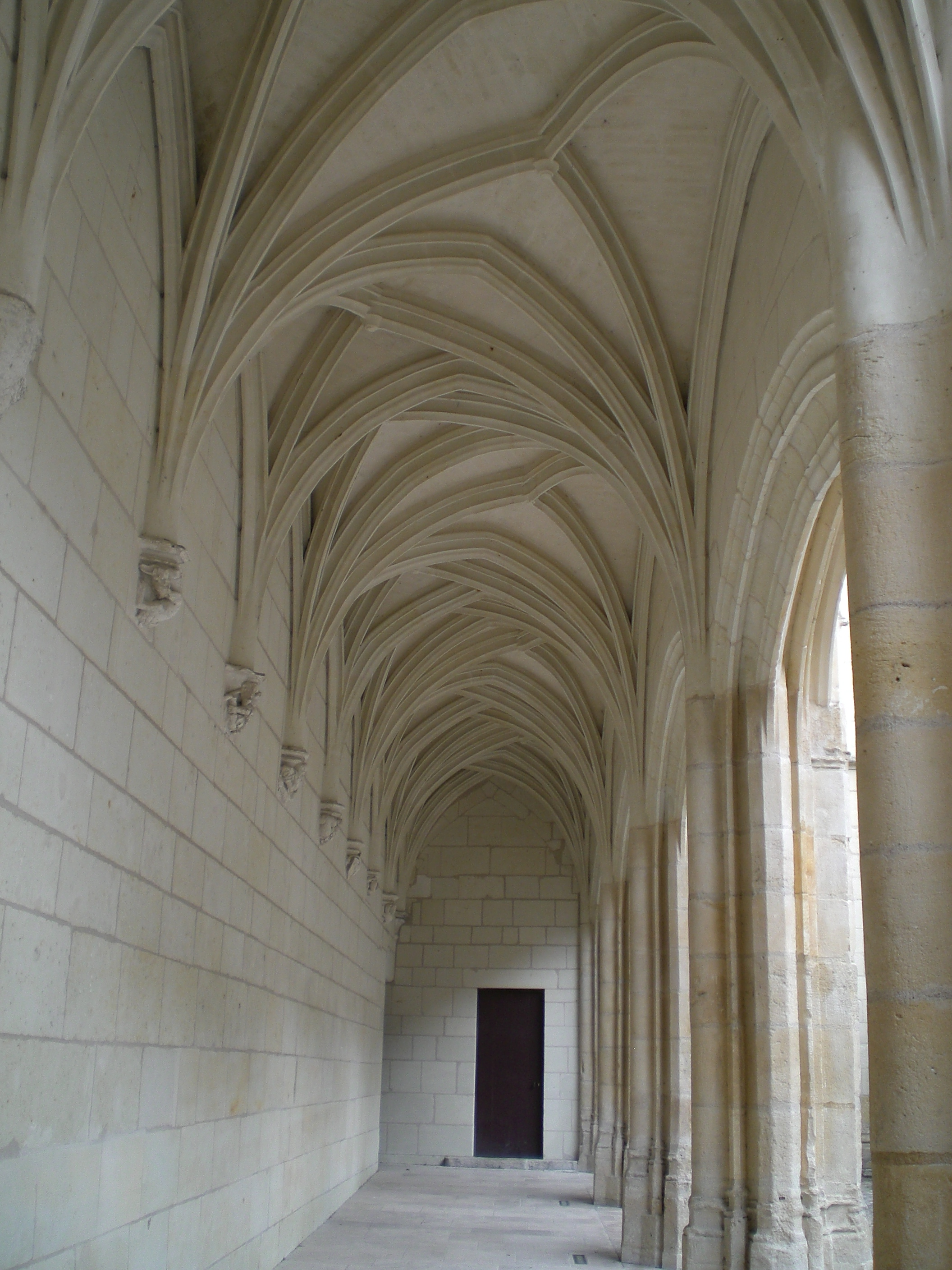 Architecture à l'intérieur du Musée des Beaux-Arts à Angers.